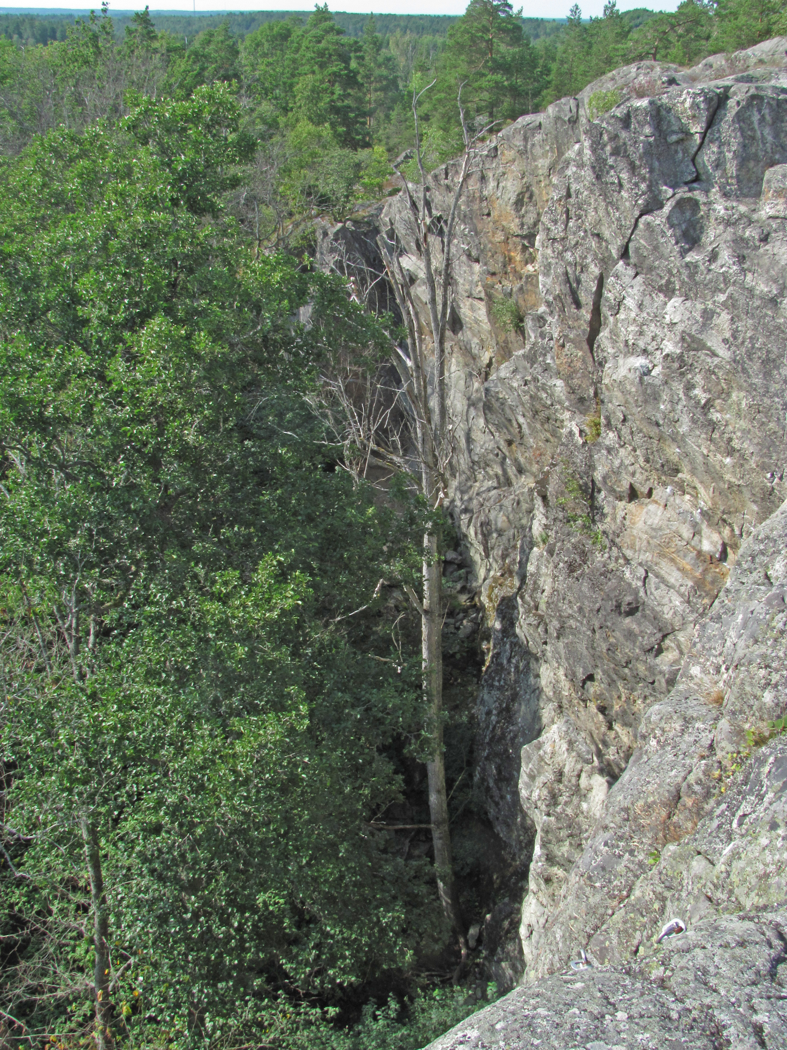 Skeviks grotta, uppifrån